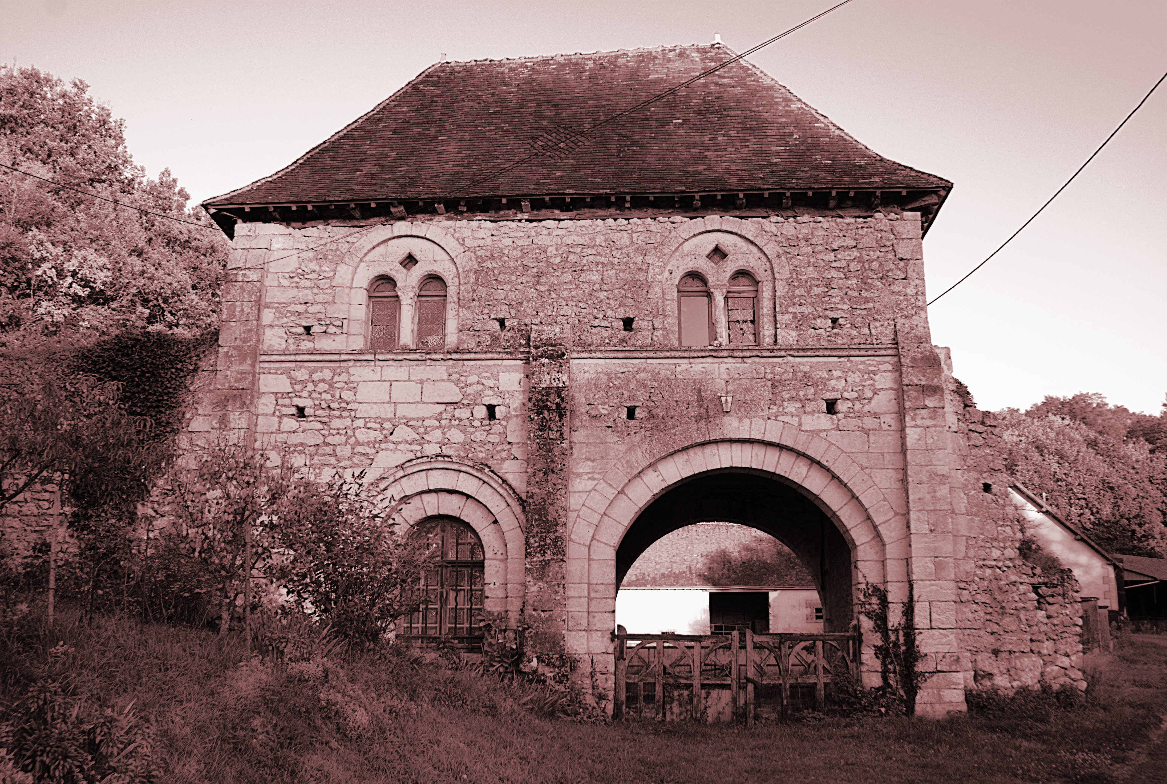 Prieuré de Courtozé, à Azé (Loir-et-Cher, France) .